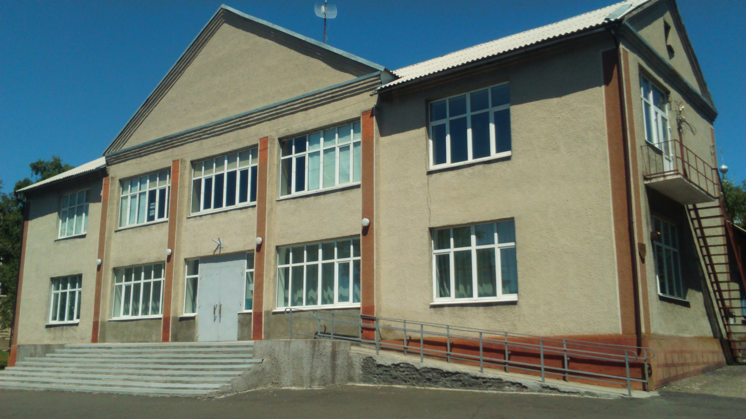 Добропі́лля — село в Україні, Добропільському районі Донецької області, над річкою Водяна.